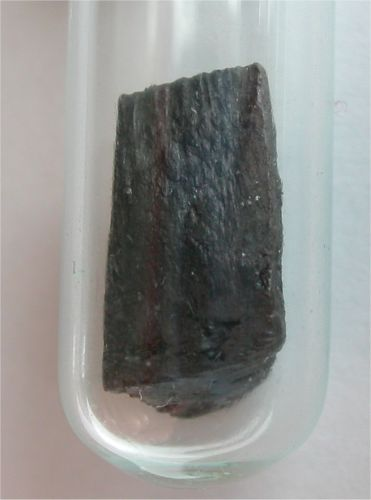 Bildbeschreibung: oxidiertes Barium Quelle: Foto aus meiner Elementesammlung Fotograf/Zeichner: Tomihahndorf Datum: April 2006